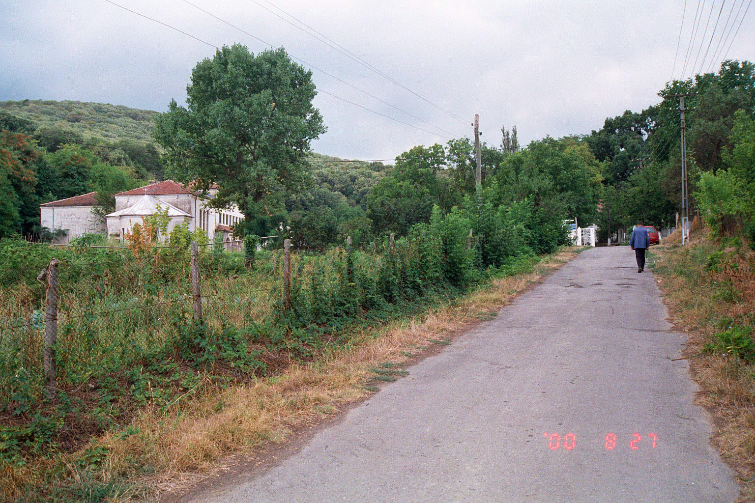 Infarten till Tichilesti leprakoloni